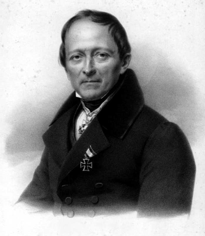 Anton Ludwig Ernst Horn (1774-1848) war ein deutscher Mediziner